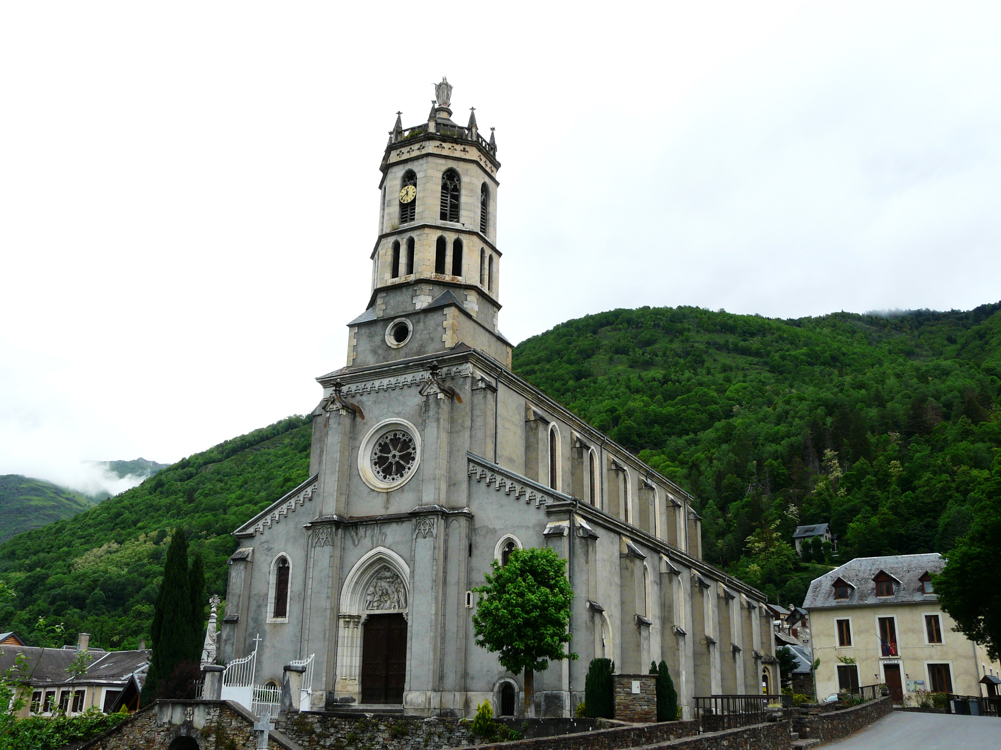 L'église Notre-Dame de l'Assomption, Montauban-de-Luchon , Haute-Garonne, France.